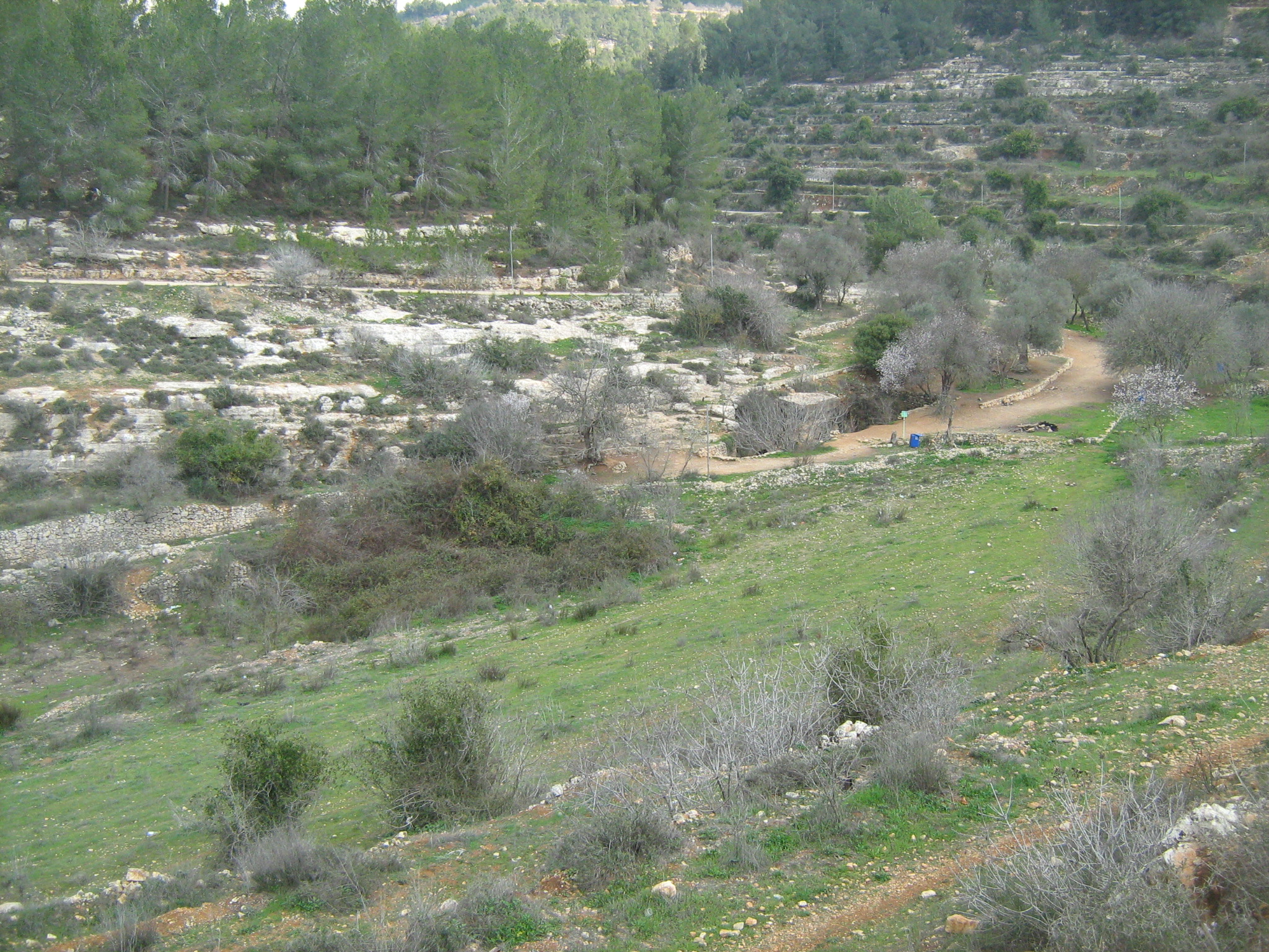 עין חנדק